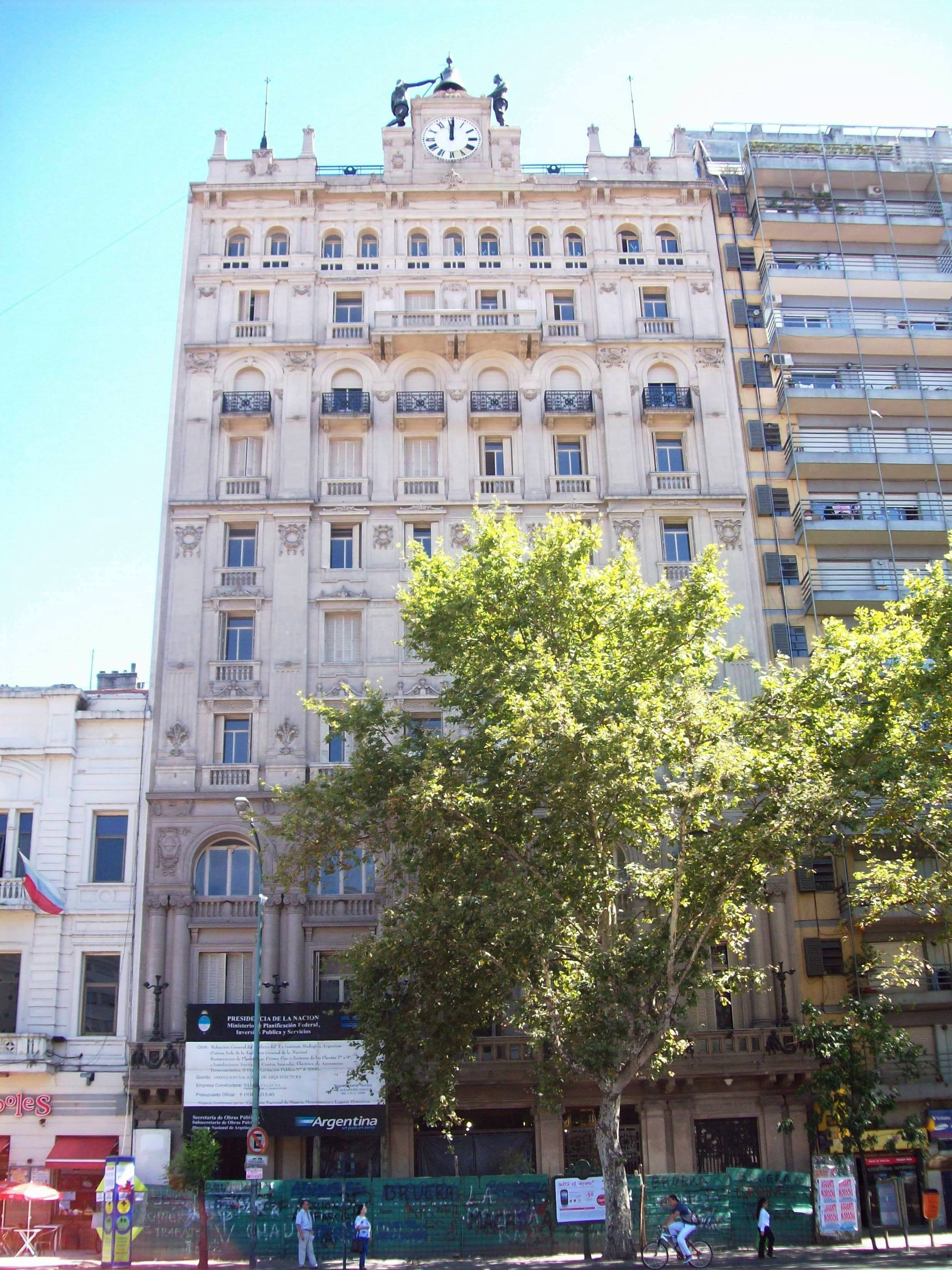 Edificio Instituto Biológico Argentino, actual auditoria de la Nación.